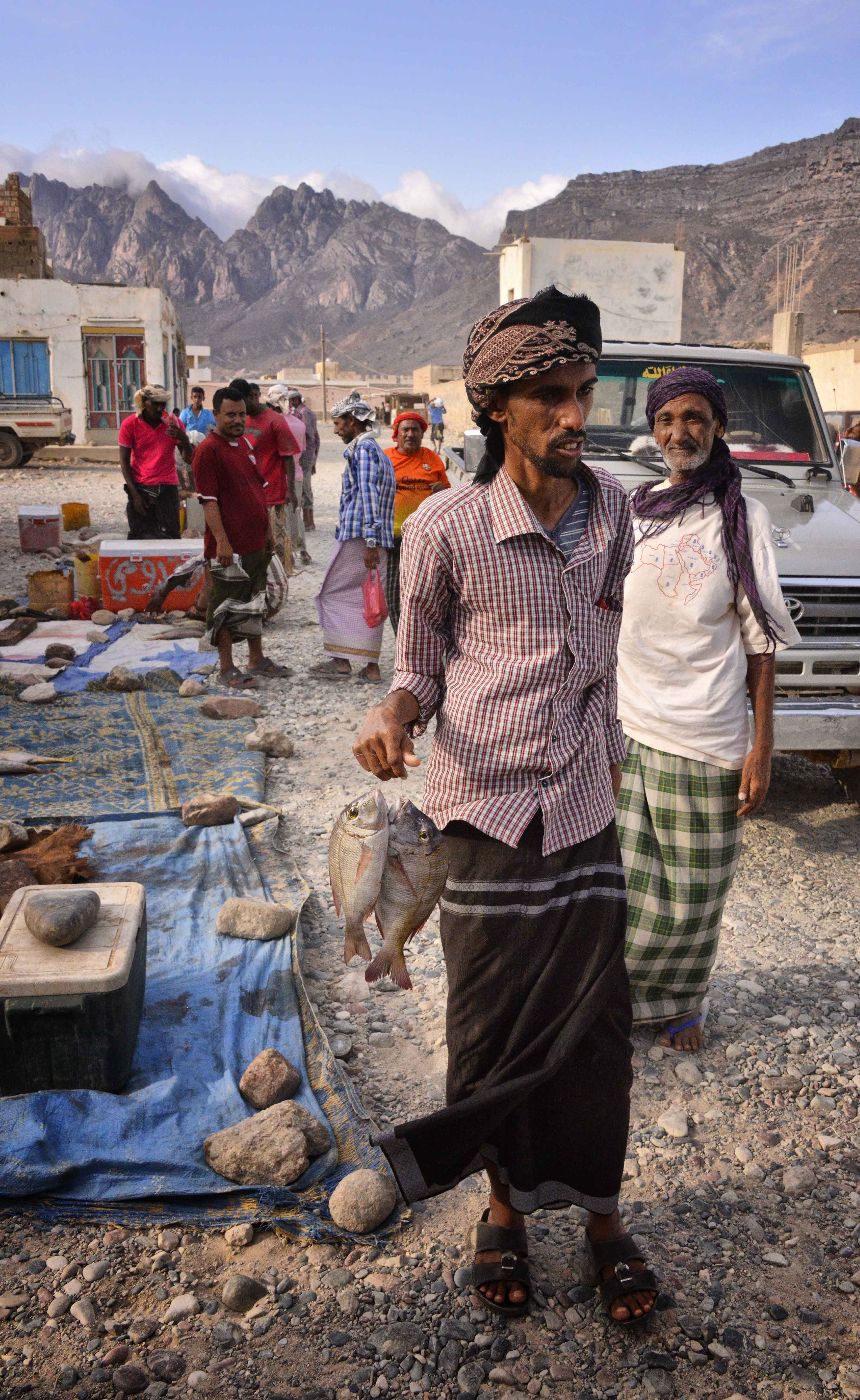 Yemen